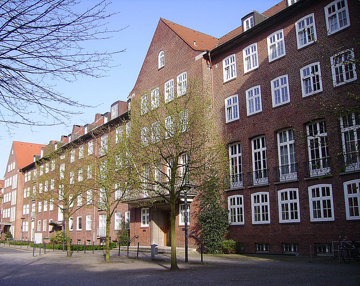 Das Erzbischöfliche Generalvikariat in Hamburg. This is a photograph of an architectural monument.